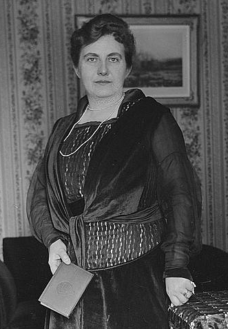 German mezzo-soprano singer Elena Gerhardt (1883-1961)